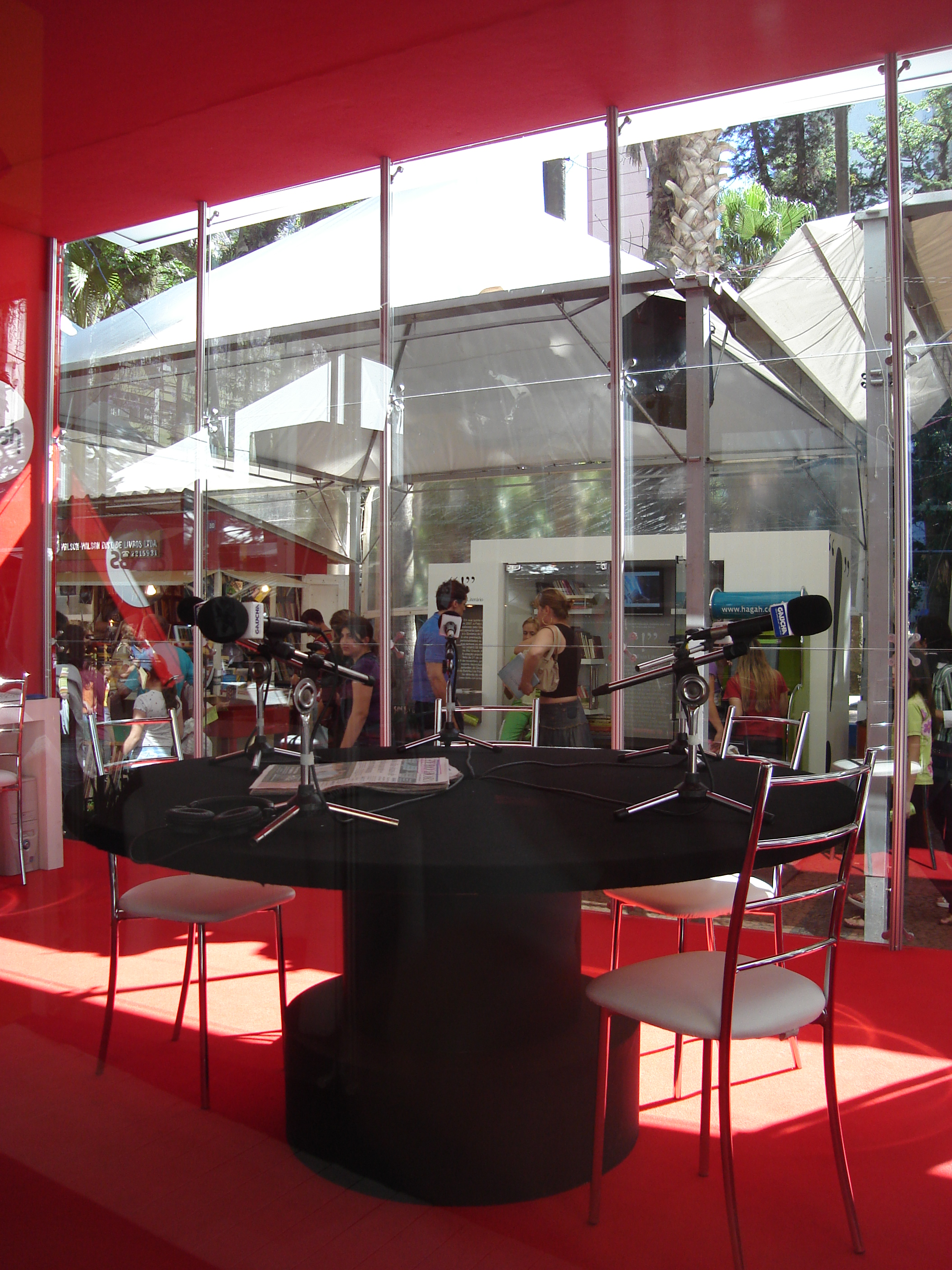 Estúdio da Rádio Gaúcha na Feira do Livro de Porto Alegre, RS.